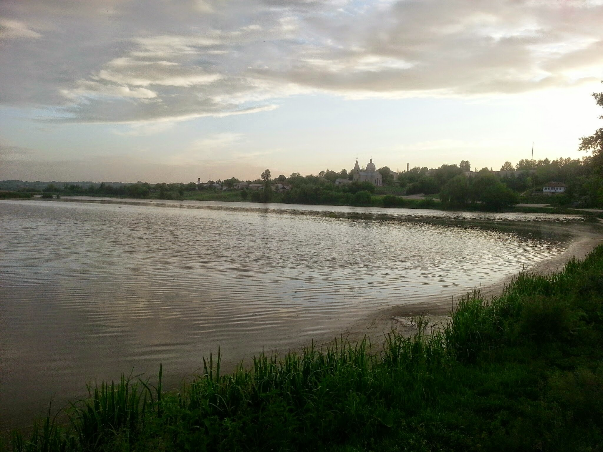 «Мурафа», Чернівецька селищна рада — 78,8 ГА Бабчинецька с/р 72,7 га, Вило-Ярузька с/р 1152,2 га, Гонтівська с/р 53,0 га, Лозівська с/р 476,9 га, Мазурівська с/р 537,2 га.